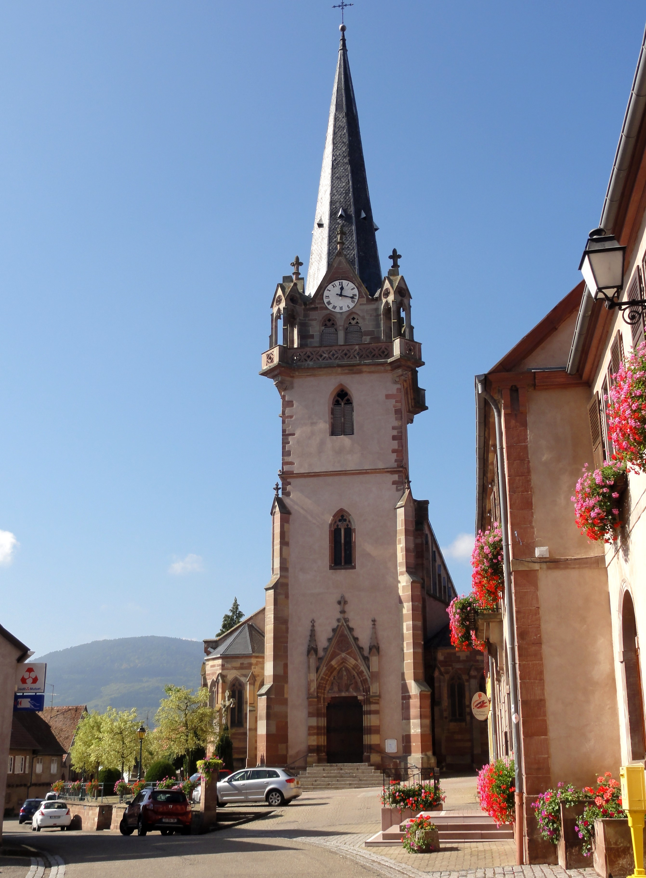 Alsace, Bas-Rhin, Église Notre-Dame de l’Assomption de Bernardswiller (PA00084612, IA00023770).